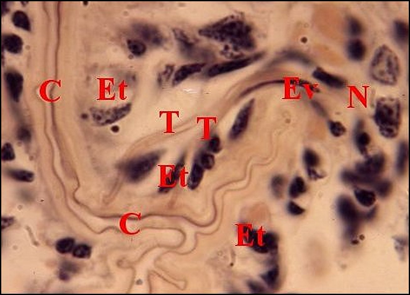 Une partie de l'organe prégonoporal de Segestria florentina en coupe histologique.